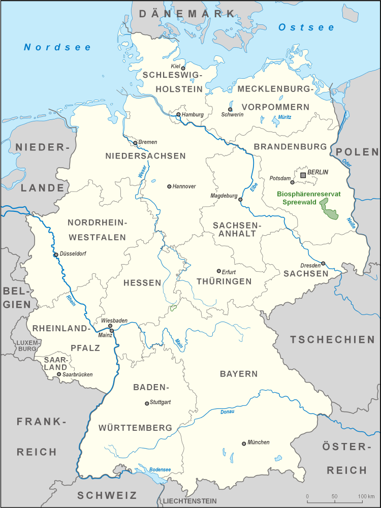 Karte des Biosphärenreservates Spreewald in Deutschland